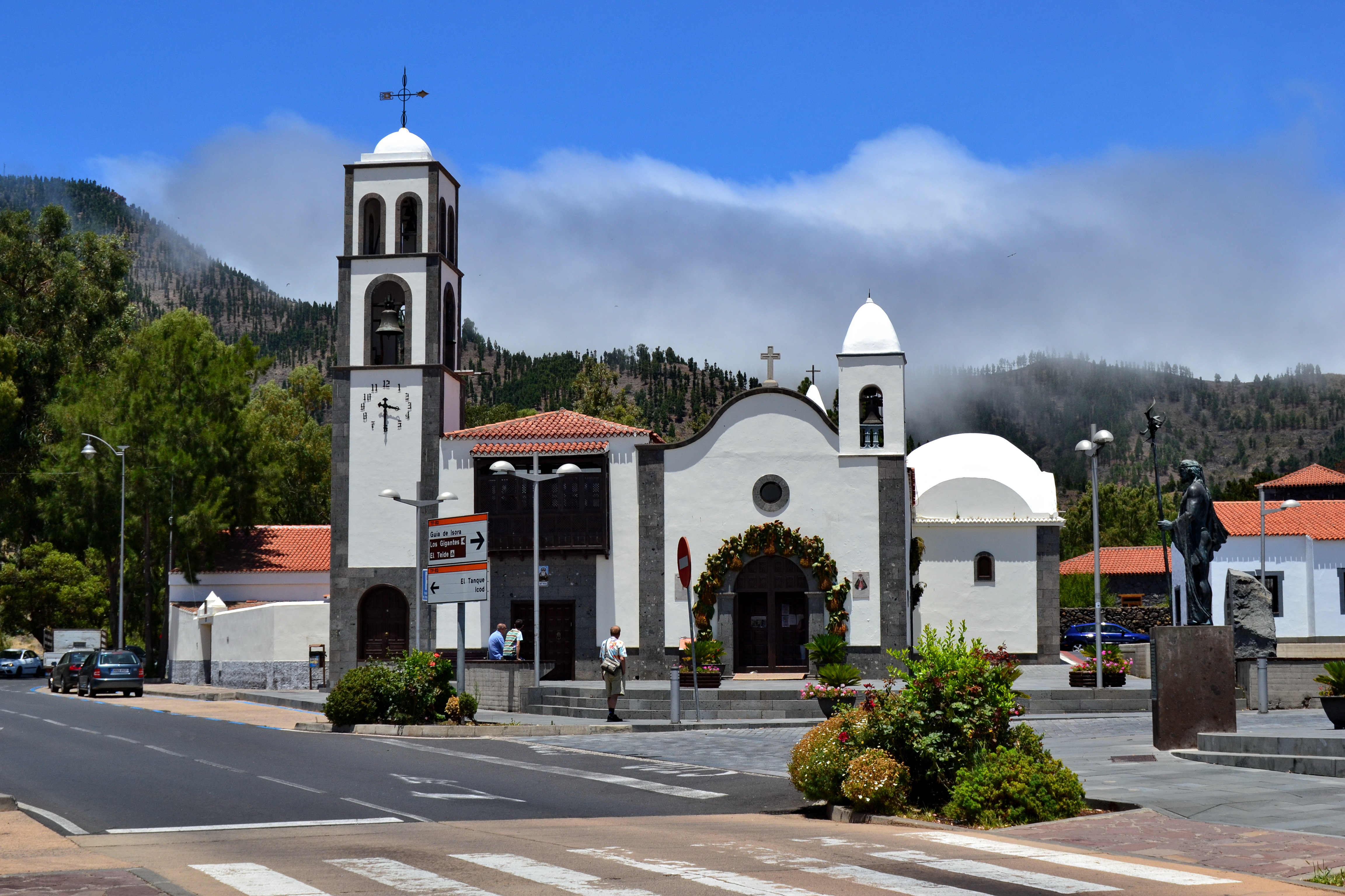 Église de Santiago del Teide, Tenerife, îles Canaries, Espagne